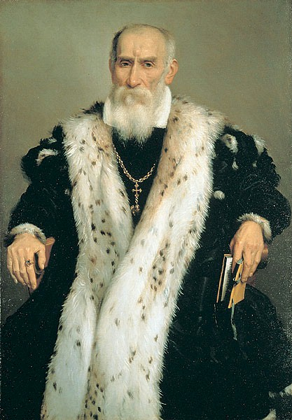 Giovanni Girolamo Albani, h/t, 107x75 cm, Milan, Collection particulière